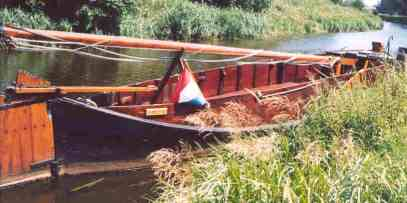 Replica "Regt door Zee" van een zomp te Rijssen.